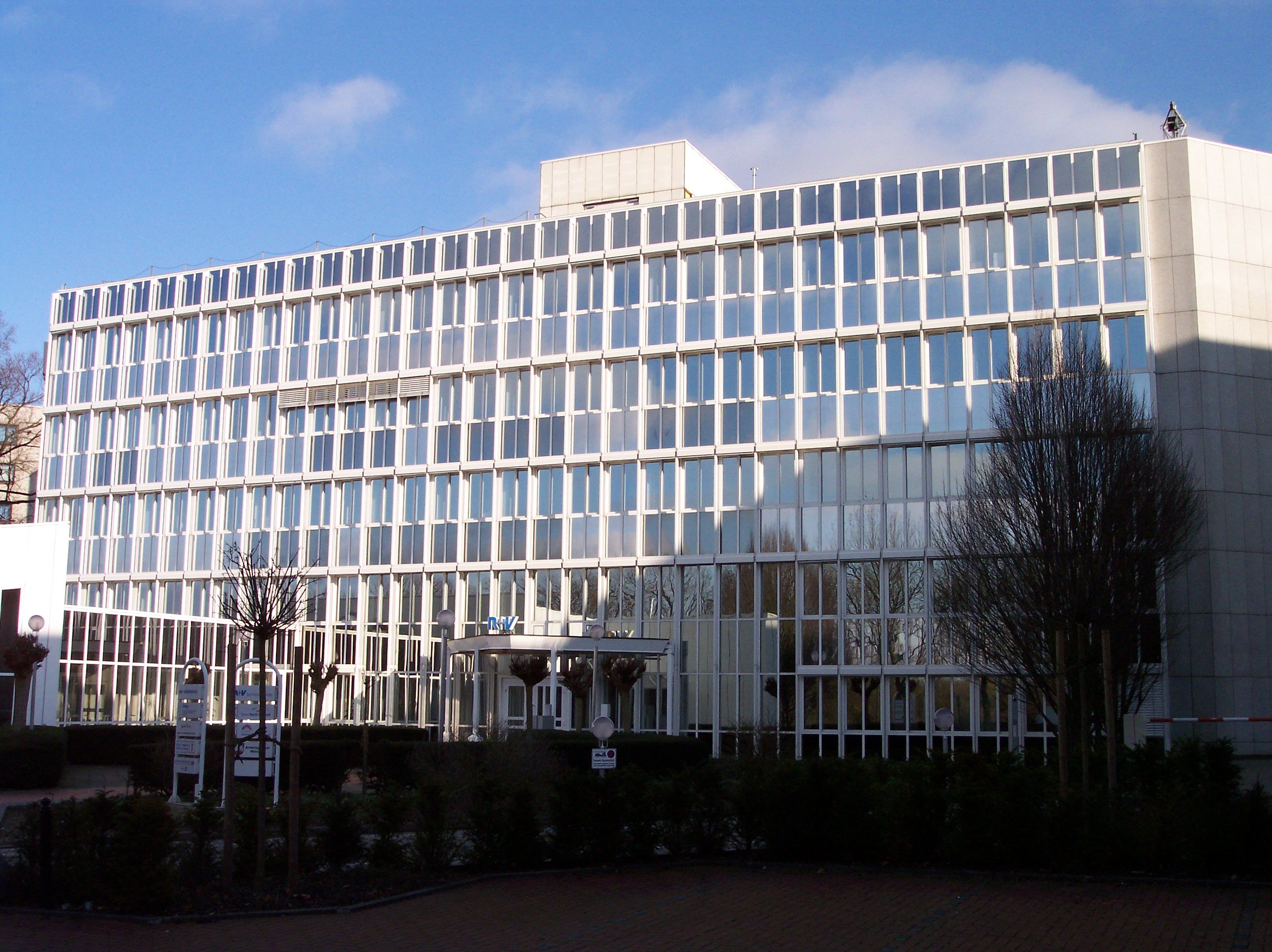 R V Versicherung Gebäude Münster